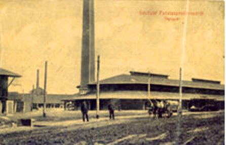 Pestszentlőrinci Téglagyár